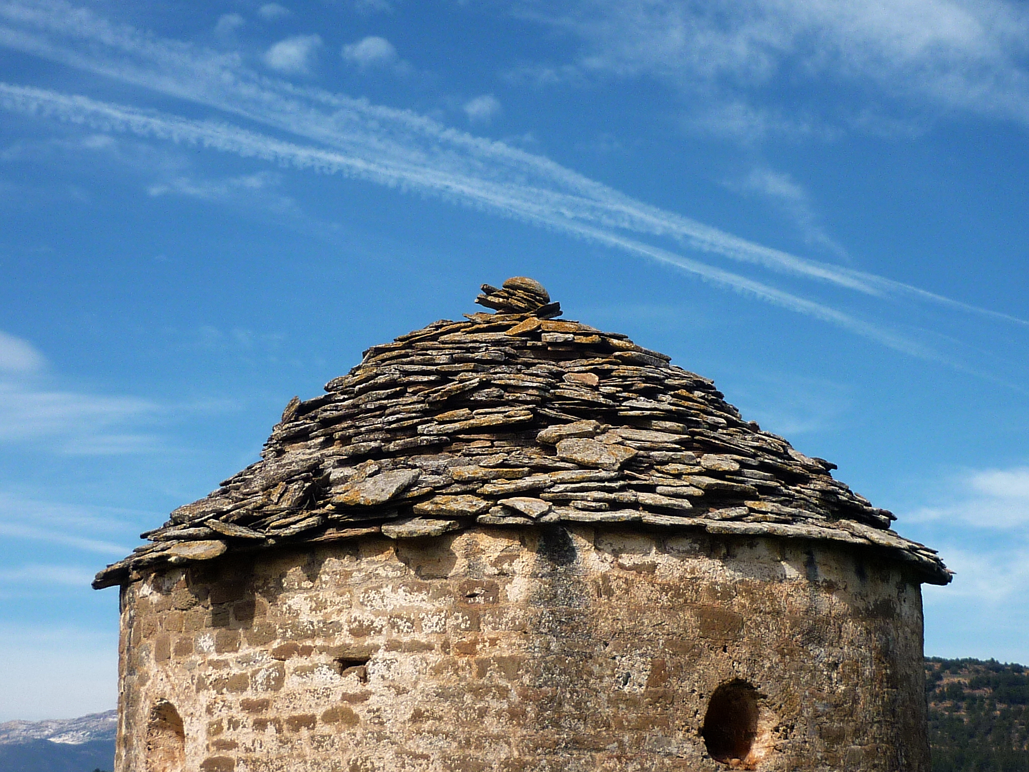 Capella de Santa Cecília de Torreblanca (Ponts)